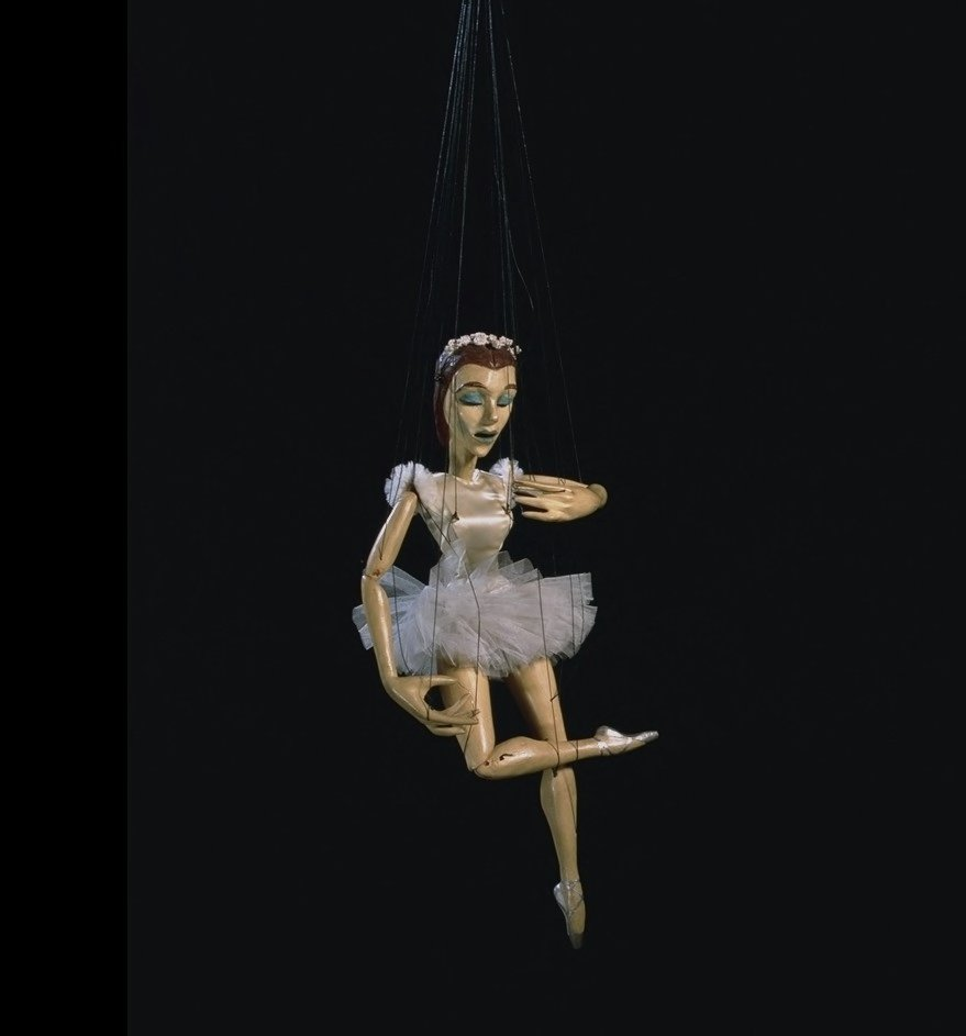 Comandament vertical; 20 fils; 1 manipulador. Cabell pintat recollit en una castanya. Ulls clossos, maquillats en blau cel. Diadema de cordó blanc. Vestit de setí amb tutú i mànigues de vel en to blanc.